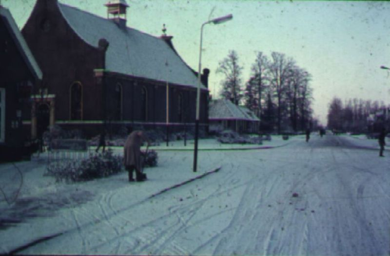 Een foto bij winterdag gemaakt in de kerkenhoek in Nieuwleusen (Overijssel, Nederland)